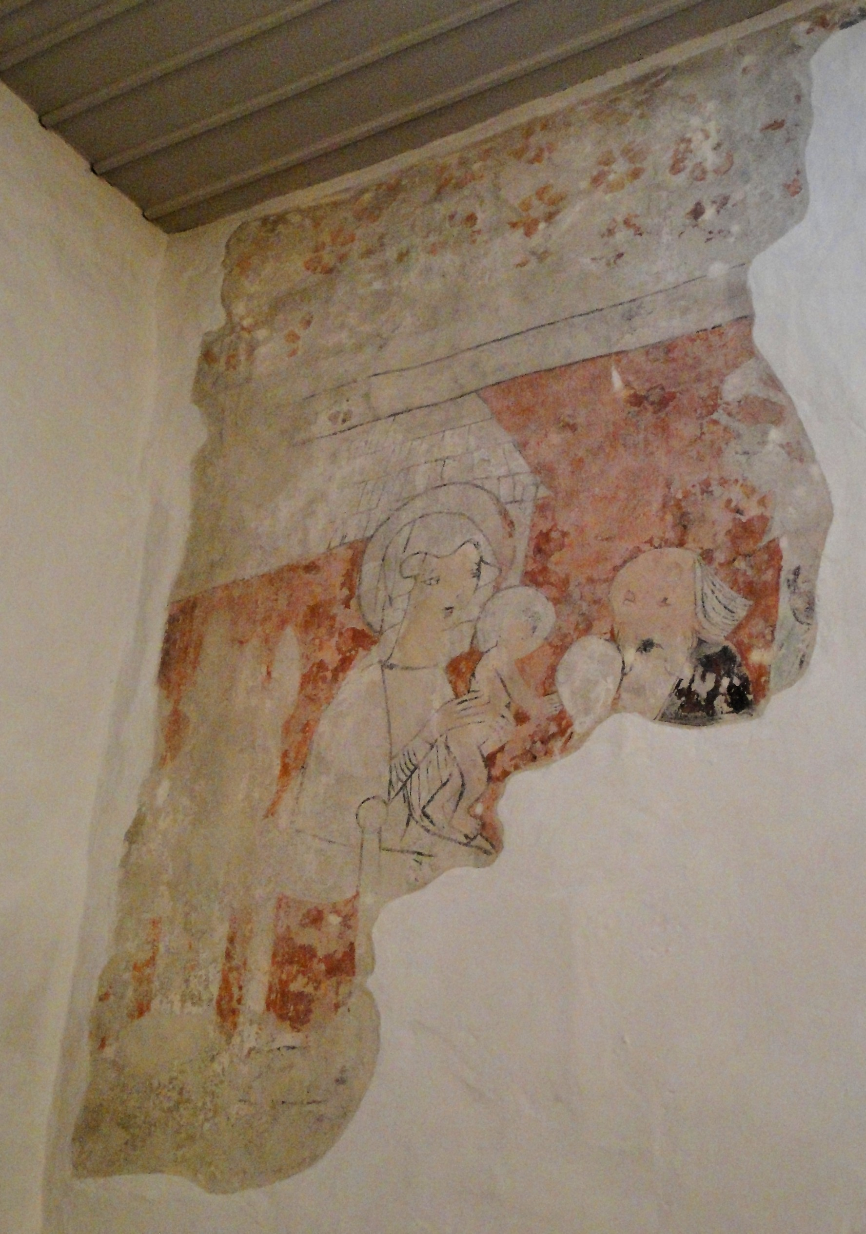 Christophoruskirche Dresden-Wilschdorf